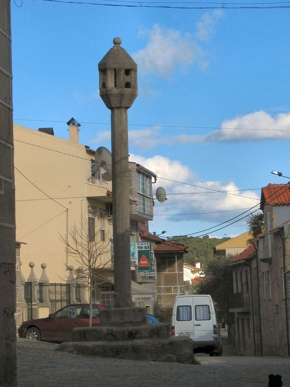 Pelourinho in Matança, Fornos de Algodres, Portugal